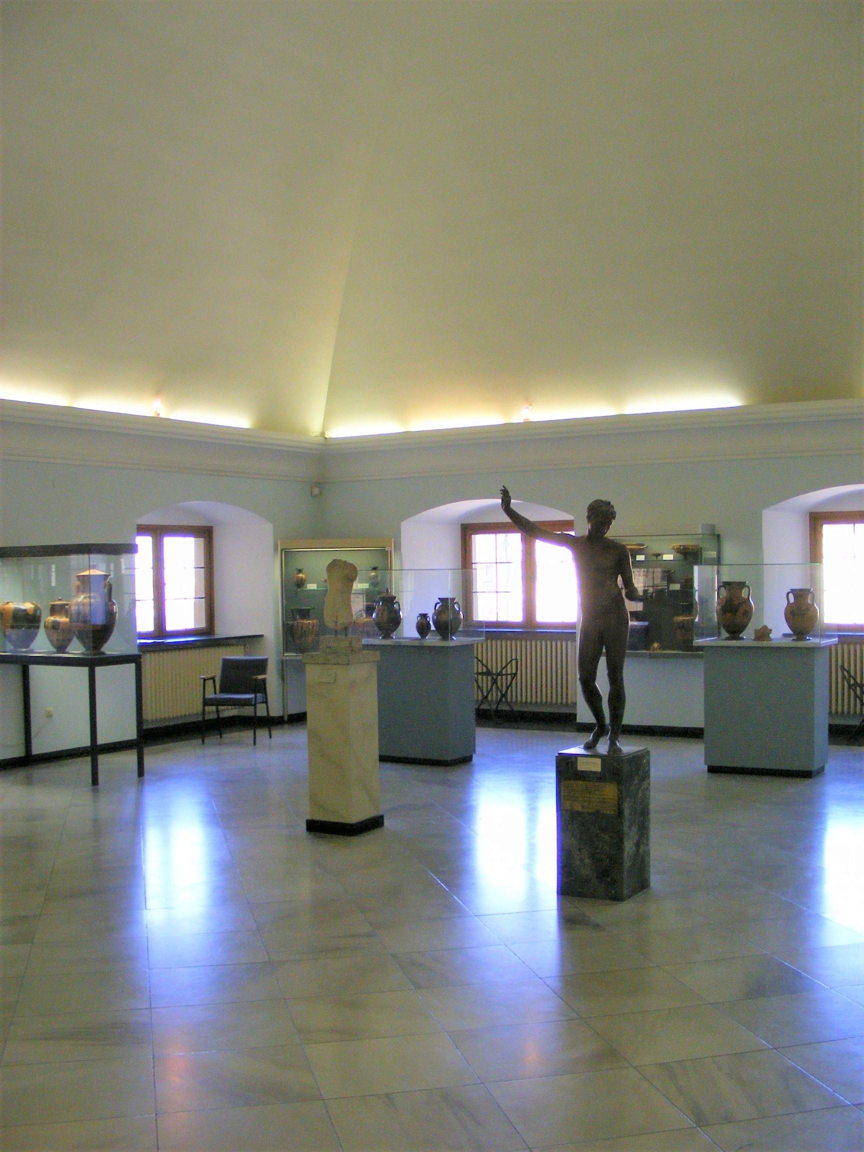 Würzburg - Martin-von-Wagner-Museum, Innenansicht von Saal D: "Griechische Keramik der Archaik" (6. Jhd. v. Chr.).